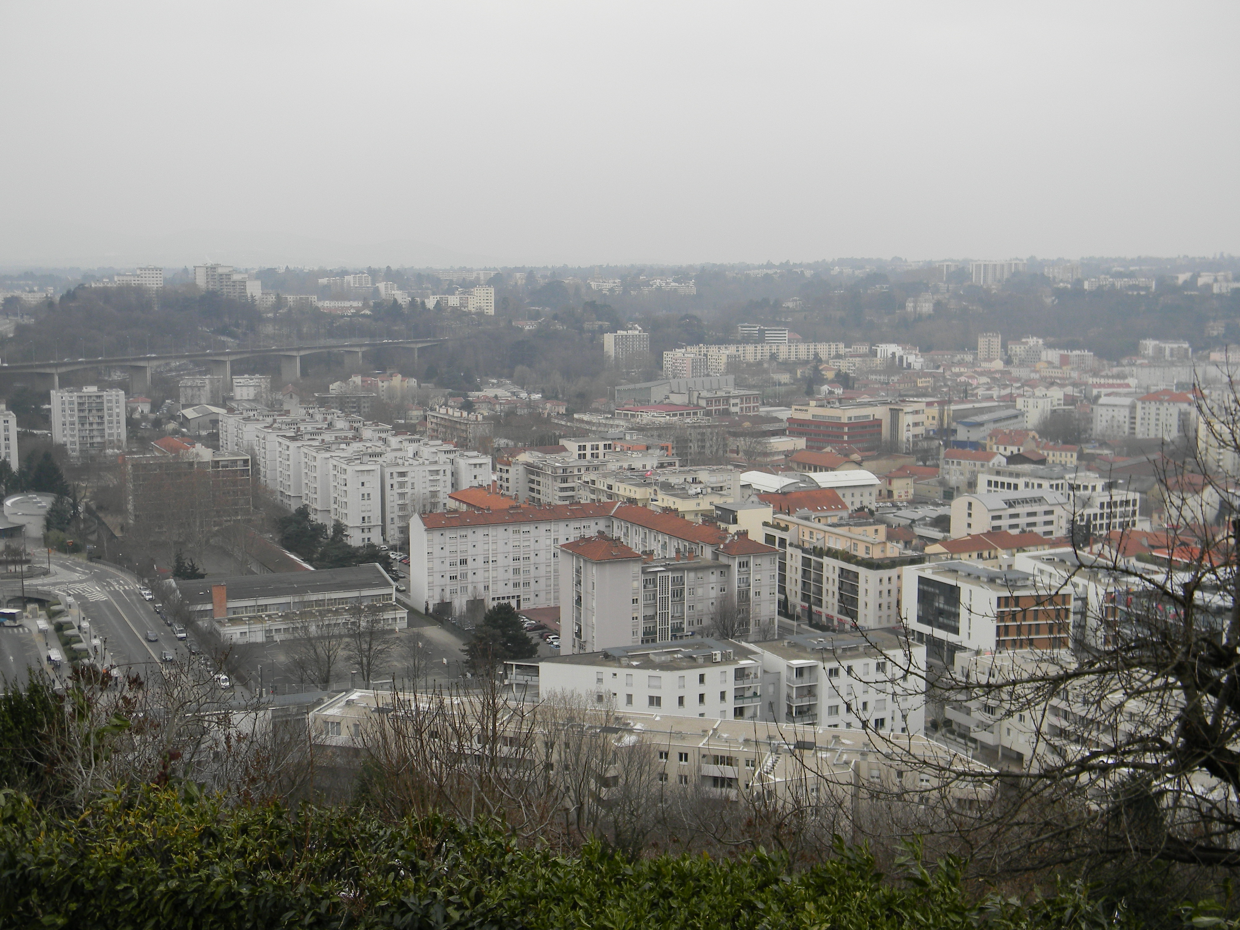 Vue depuis les jardins ouvriers de Loyasse sur le quartier Gorge-de-Loup à Lyon.